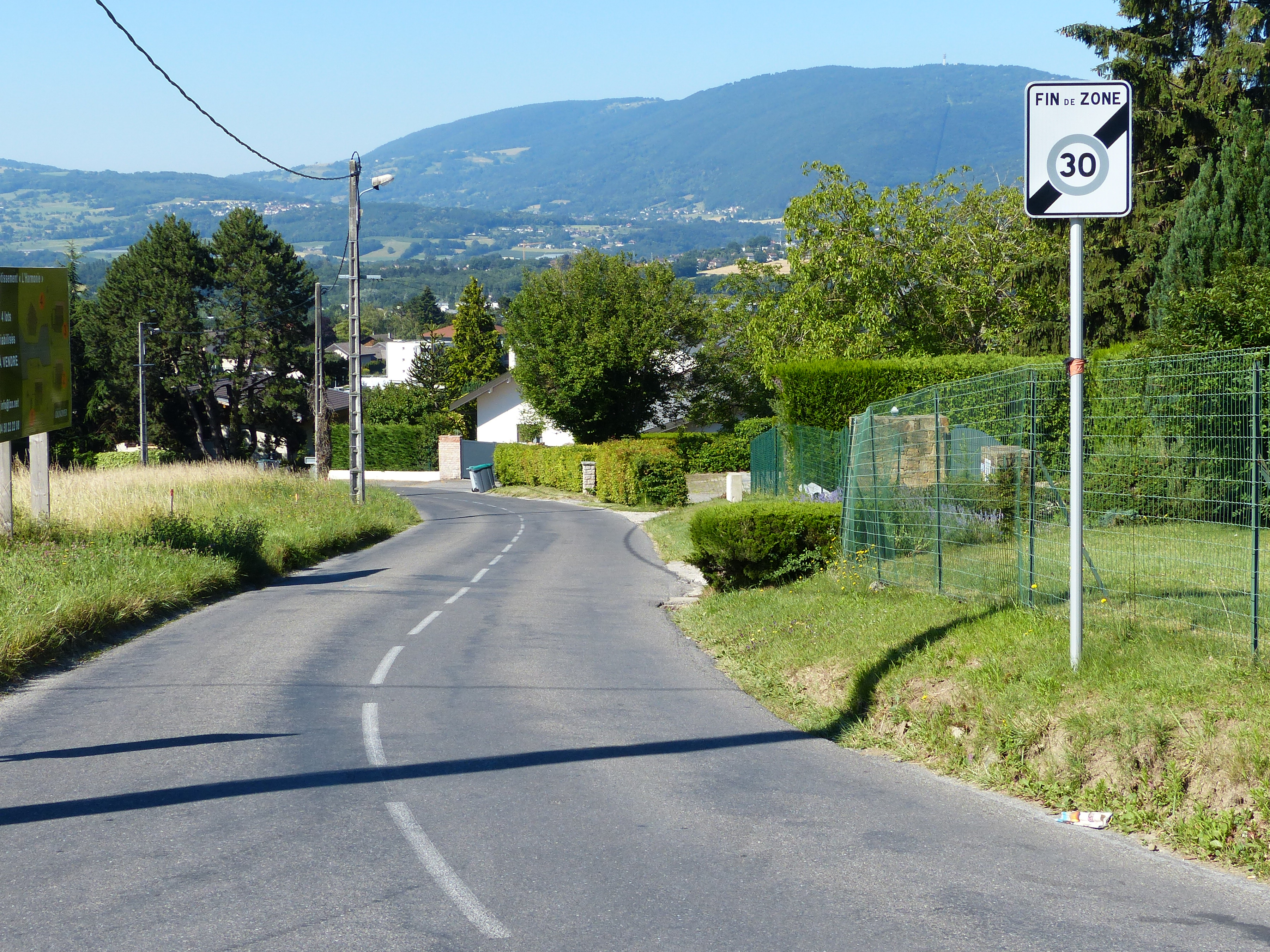 Panneau B51 et ligne discontinue de dissuasion T3, Lossy, Cranves-Sales, Haute-Savoie, France.